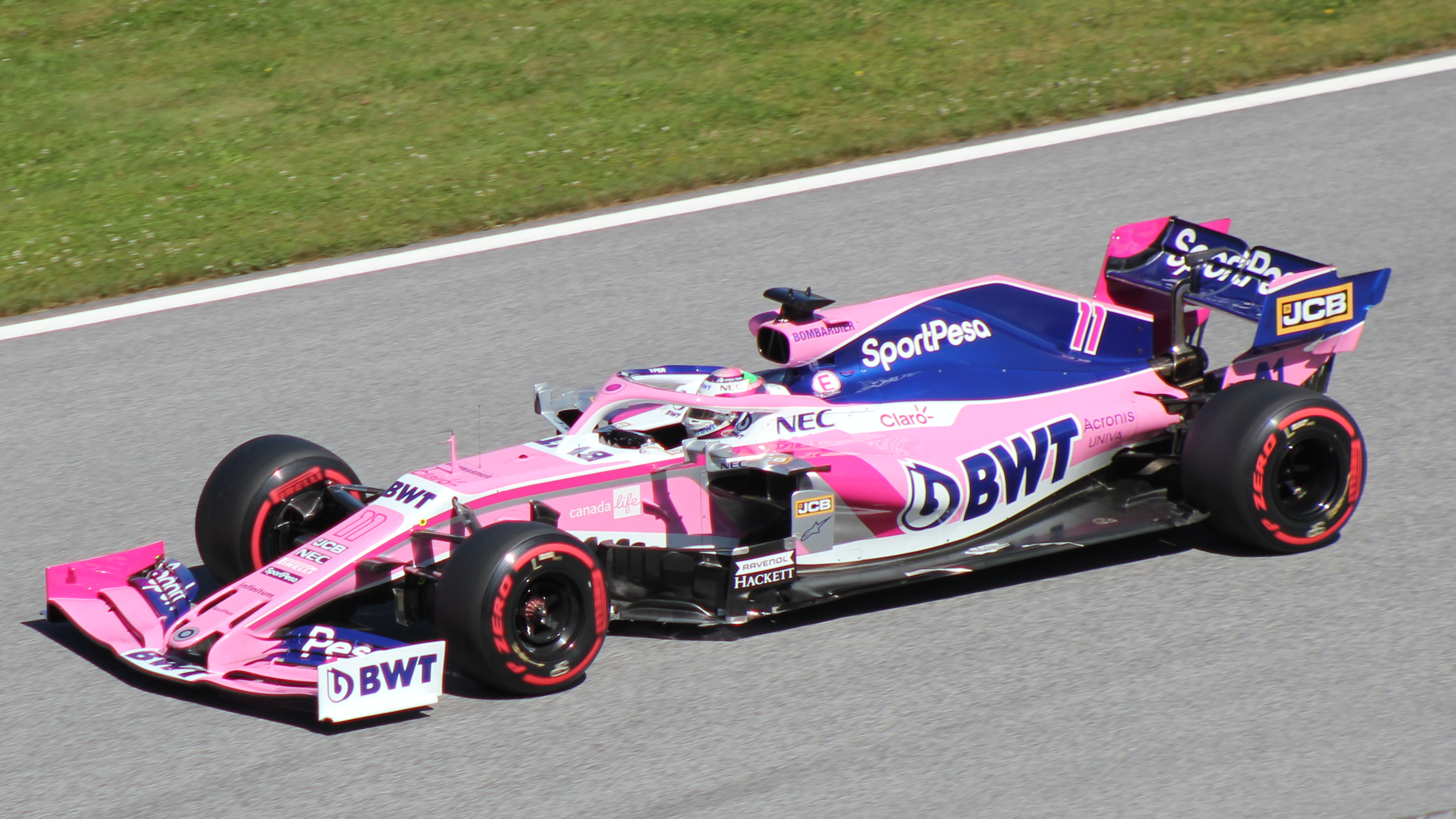 Perez beim Rennwochenende in Österreich 2019